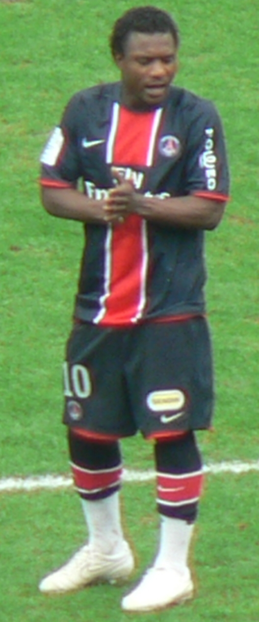 Sessegnon lors de PSG 2-1 Nice.